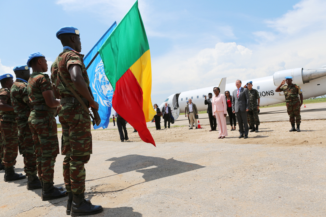 The Special Representative of the UN Secretary-General in the D. R. Congo, Martin Kobler, on his arrival in Kalemie, Katanga province, to officiate a medal parade ceremony organized by the Beninese contingent of MONUSCO Force. Next to the SRSG is the ambassador of Benin to the D. R. Congo who also travelled to the area to witness the event. Photo: MONUSCO/Myriam Asmani Le Représentant spécial du Secrétaire général de l’ONU en R.D. Congo, Martin Kobler, à son arrivée à Kalémie, province du Katanga, pour présider une cérémonie de remise de médaille organisée par le contingent béninois de la Force de la MONUSCO. Le Représentant spécial avait à ses côtés l’ambassadrice du Benin en R. D. Congo, elle aussi ayant fait le déplacement pour être témoin de l’événement. Photo : MONUSCO/Myriam Asmani.